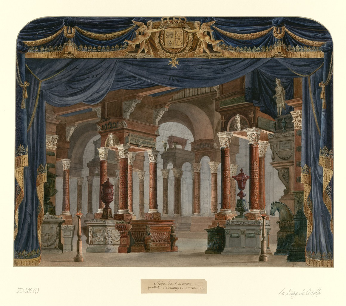 Les tombeaux de Corinthe, décor de l'acte III, tableau 1, du Siège de Corinthe esquissé par Auguste Caron